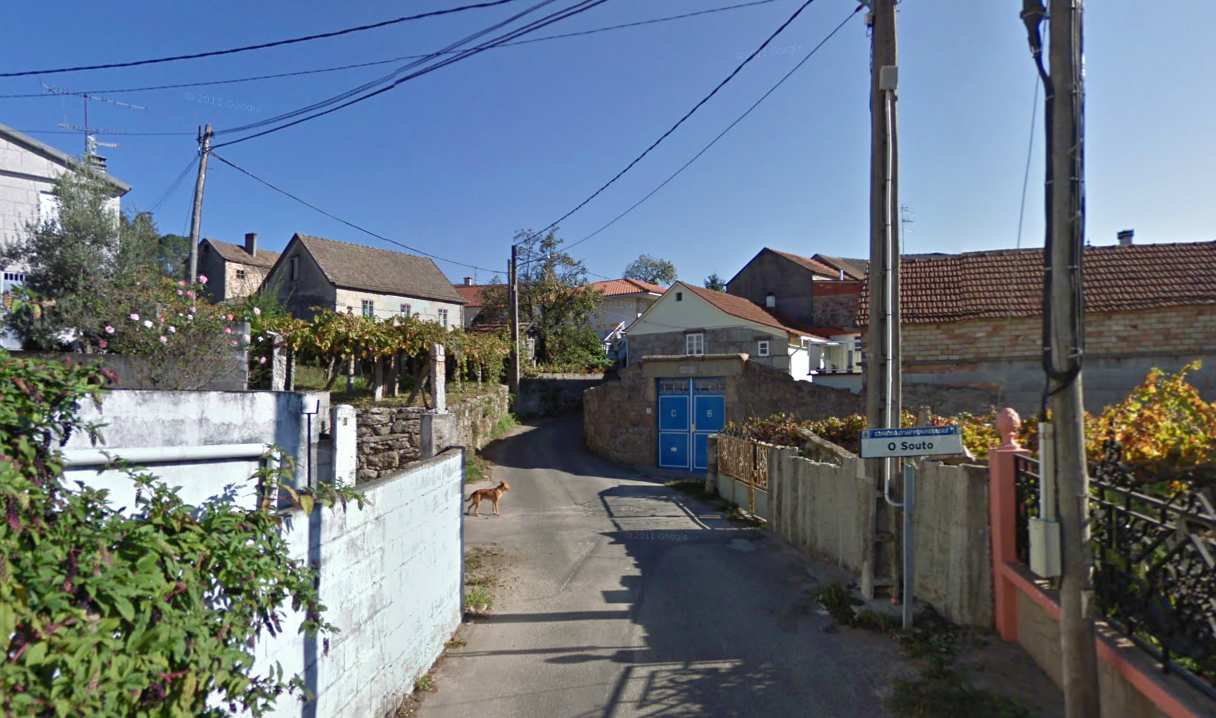 Entrada ao lugar do Souto, Xinzo, Ponteareas.